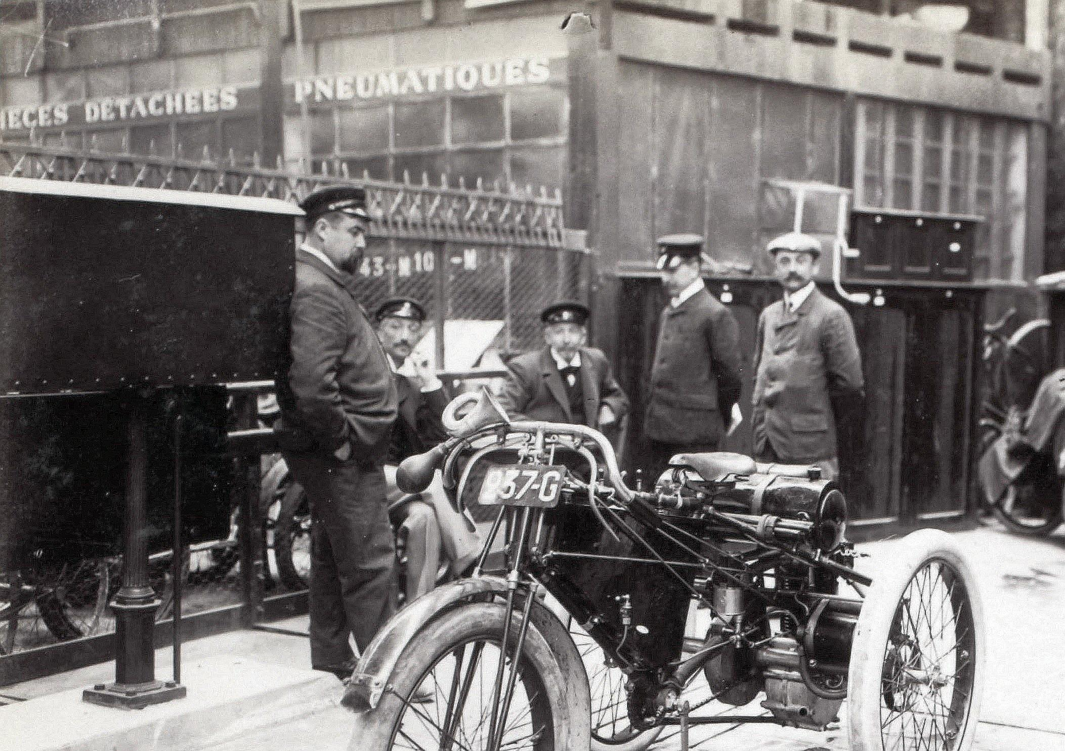 [Collection Jules Beau. Photographie sportive] : T. 17. Année 1902 / Jules Beau : F. 12v. [Caravane Paris - Nice]